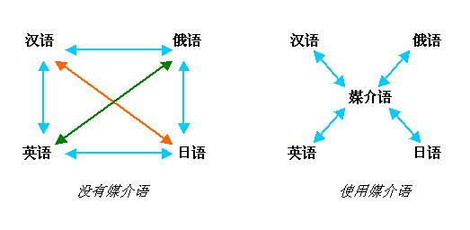 媒介语示意图 百无一用是书生 (Talk) 制作于2004年9月22日